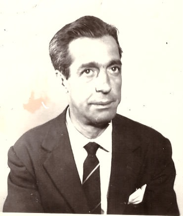 Fototessera ritraente Enrico Ardù